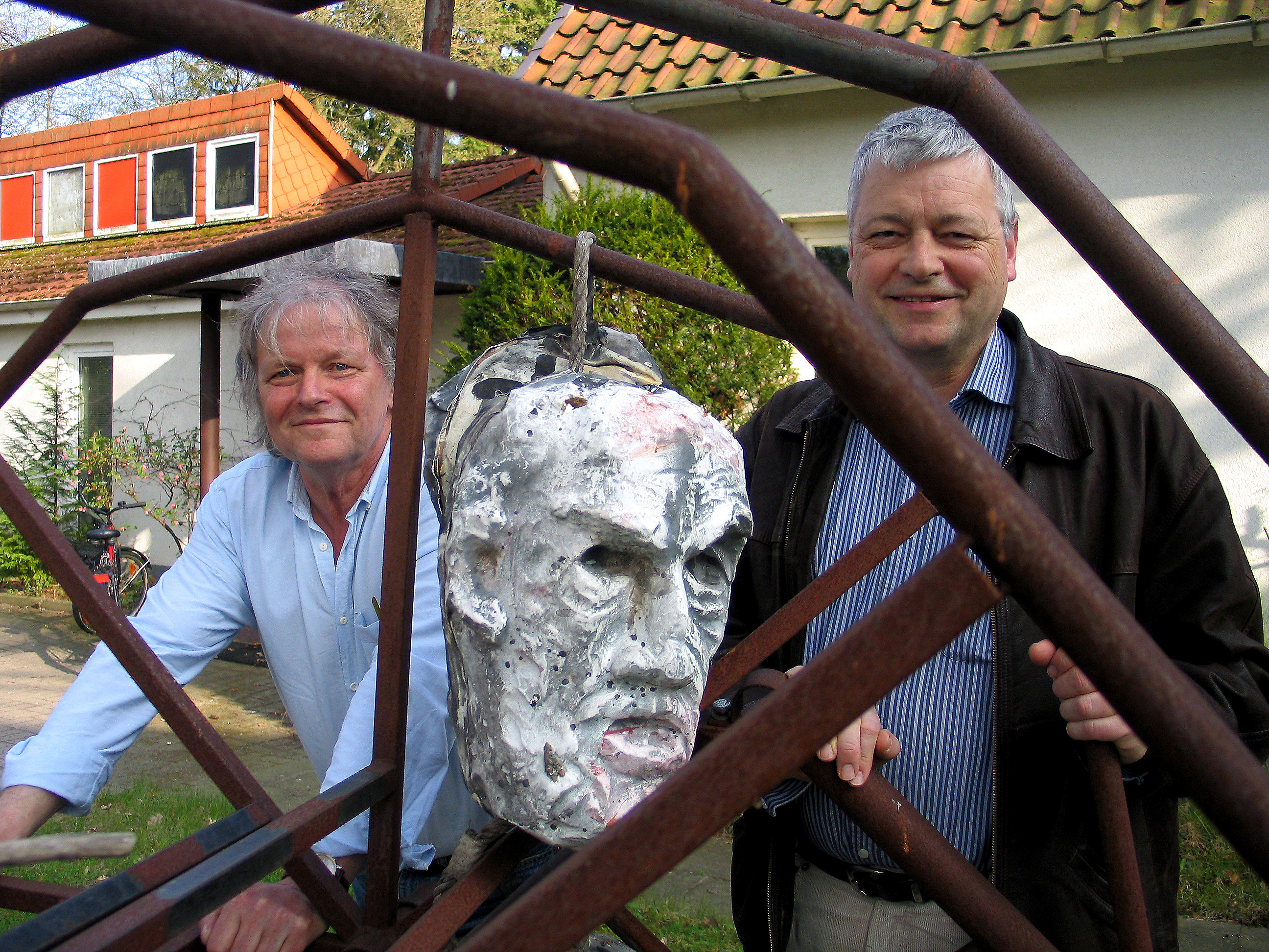 Der Künstler Frank Schult (links) und Superintendent Hans-Georg Sundermann, Pastor an der Stadtkirche St. Marien in Celle, hier hinter einem Bühnenbild-Detail aus den 2010 in der Residenzhalle in Celle aufgeführten Nibelungen von Moritz Rinke ...